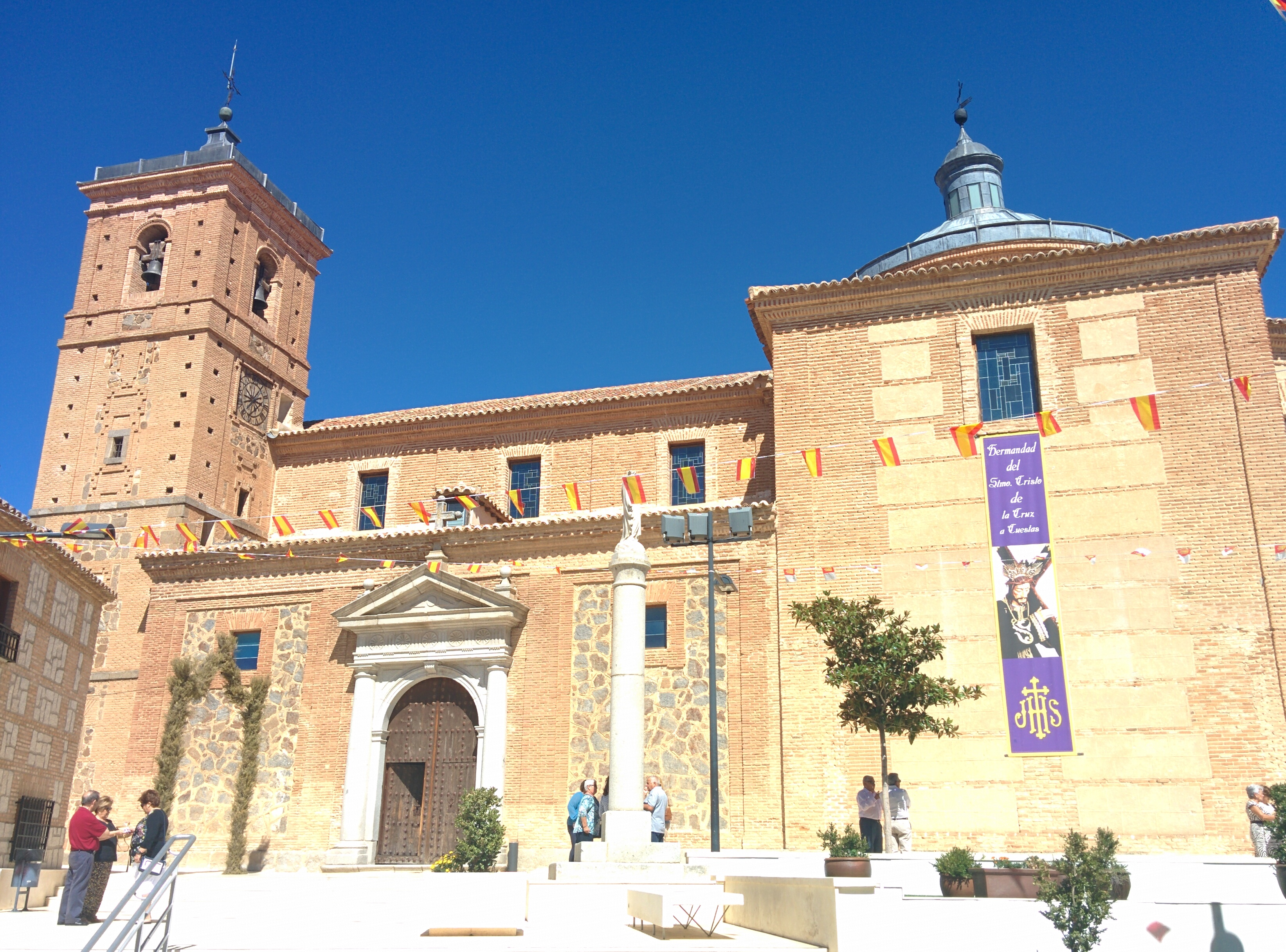 Iglesia de San Pedro y San Pablo, en Polán (Toledo, España).